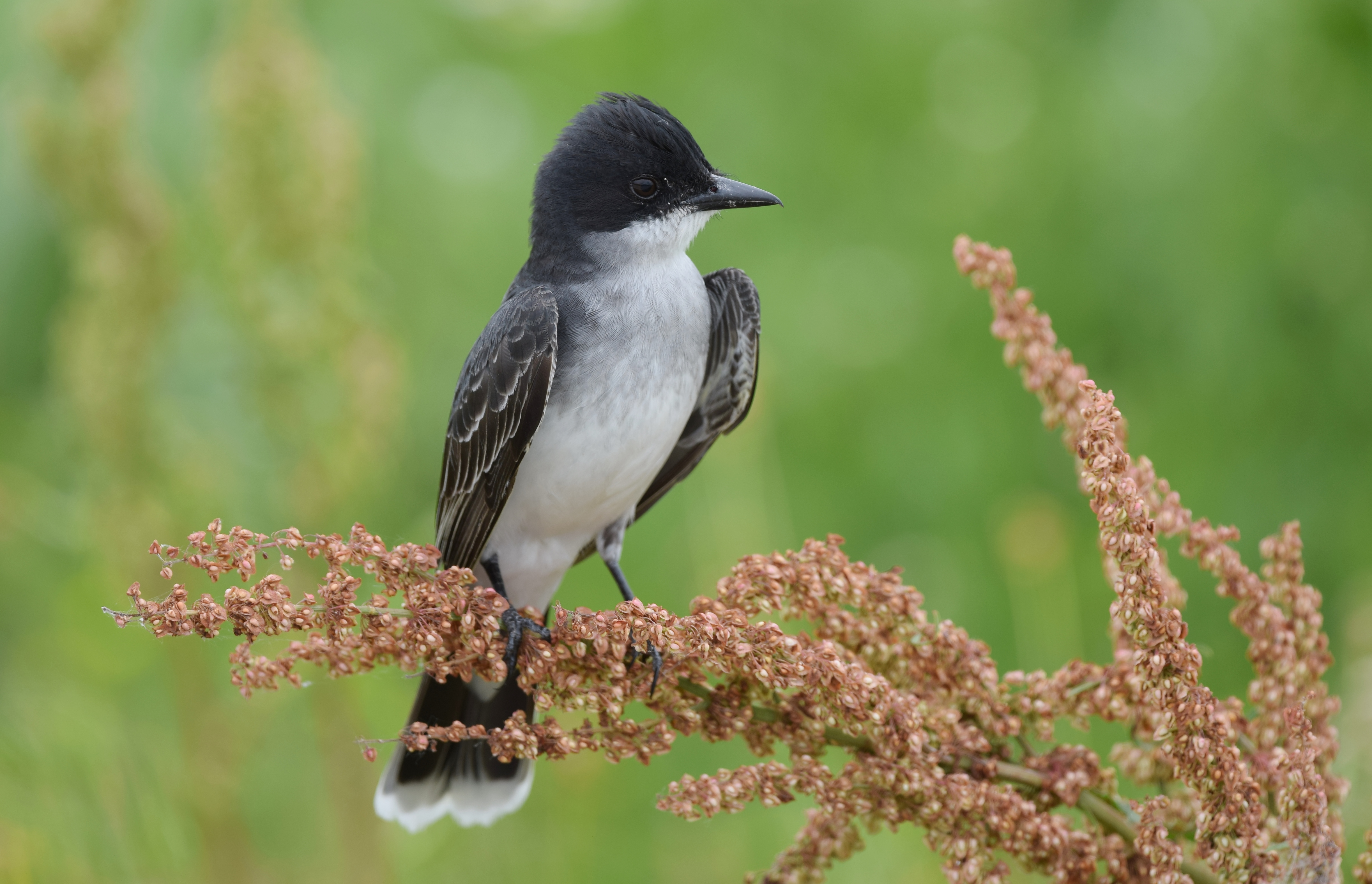 Clarence Canon NWR Annada MO 6/4/17